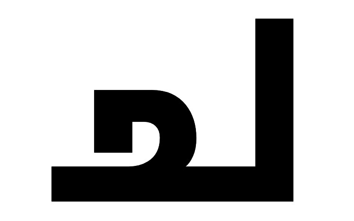 ച മലയാളം അക്ഷരം